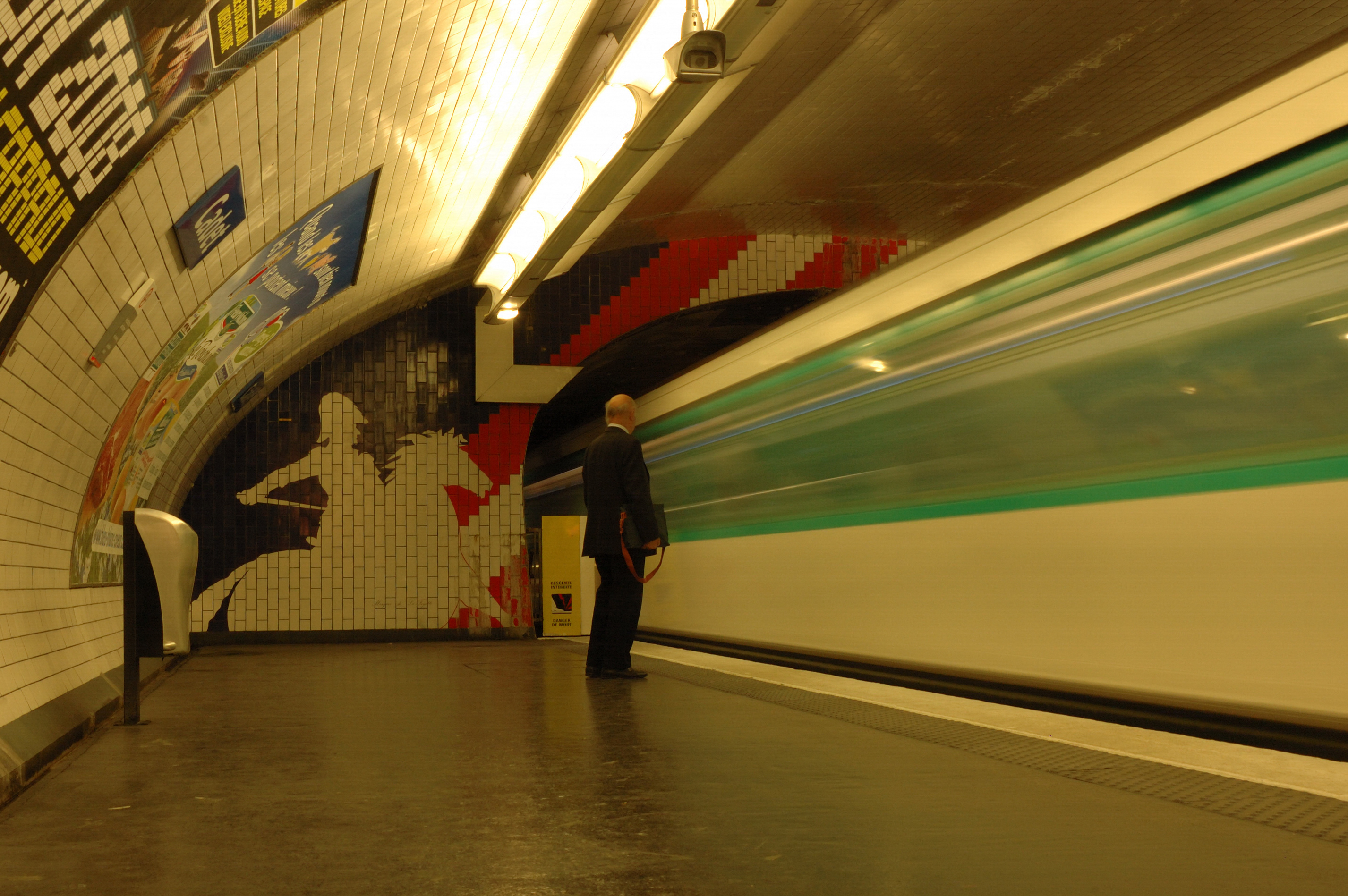 Entrée en gare du train à la station Cadet de la ligne 7 du métro Parisien.